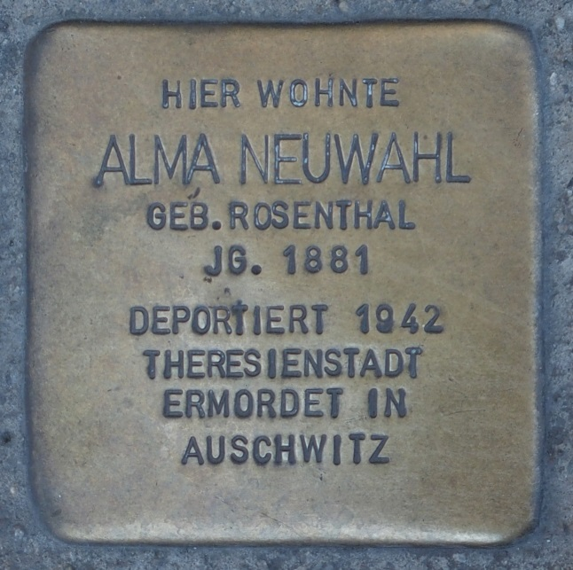 Stolperstein in Soest Brüderstraße 36, Alma Neuwahl